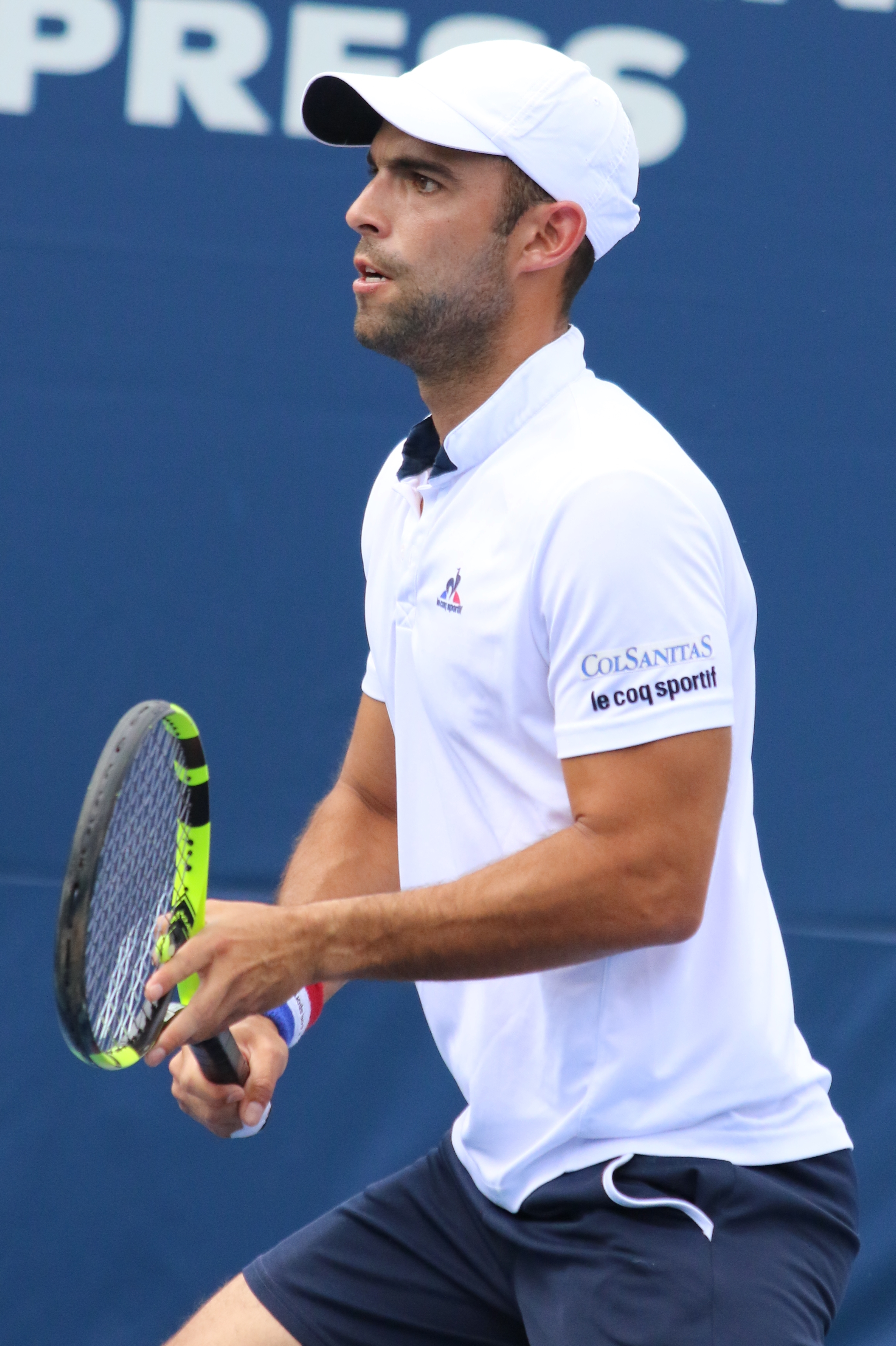 Cabal US16 (11)